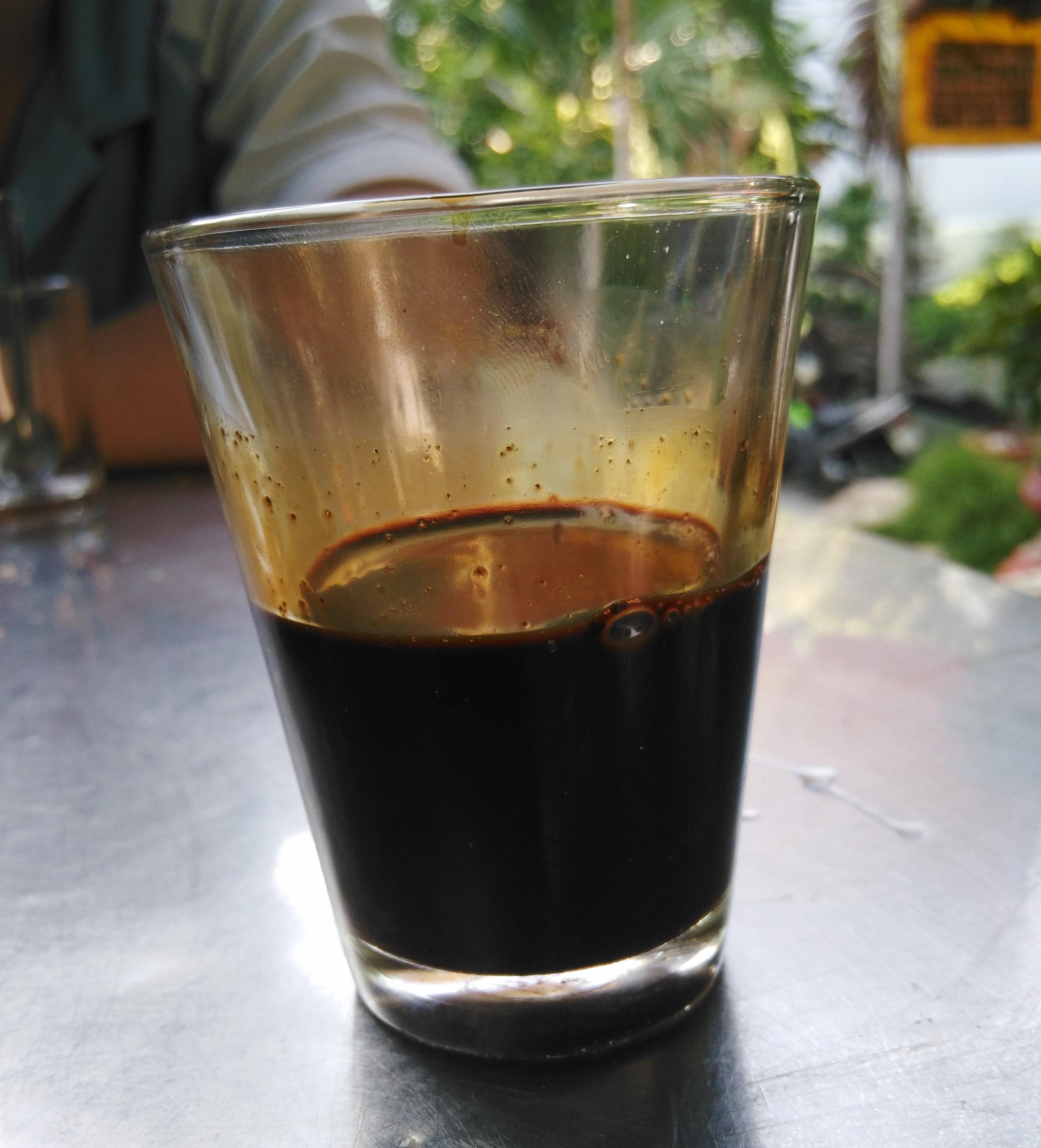 Cuisine of Vietnam